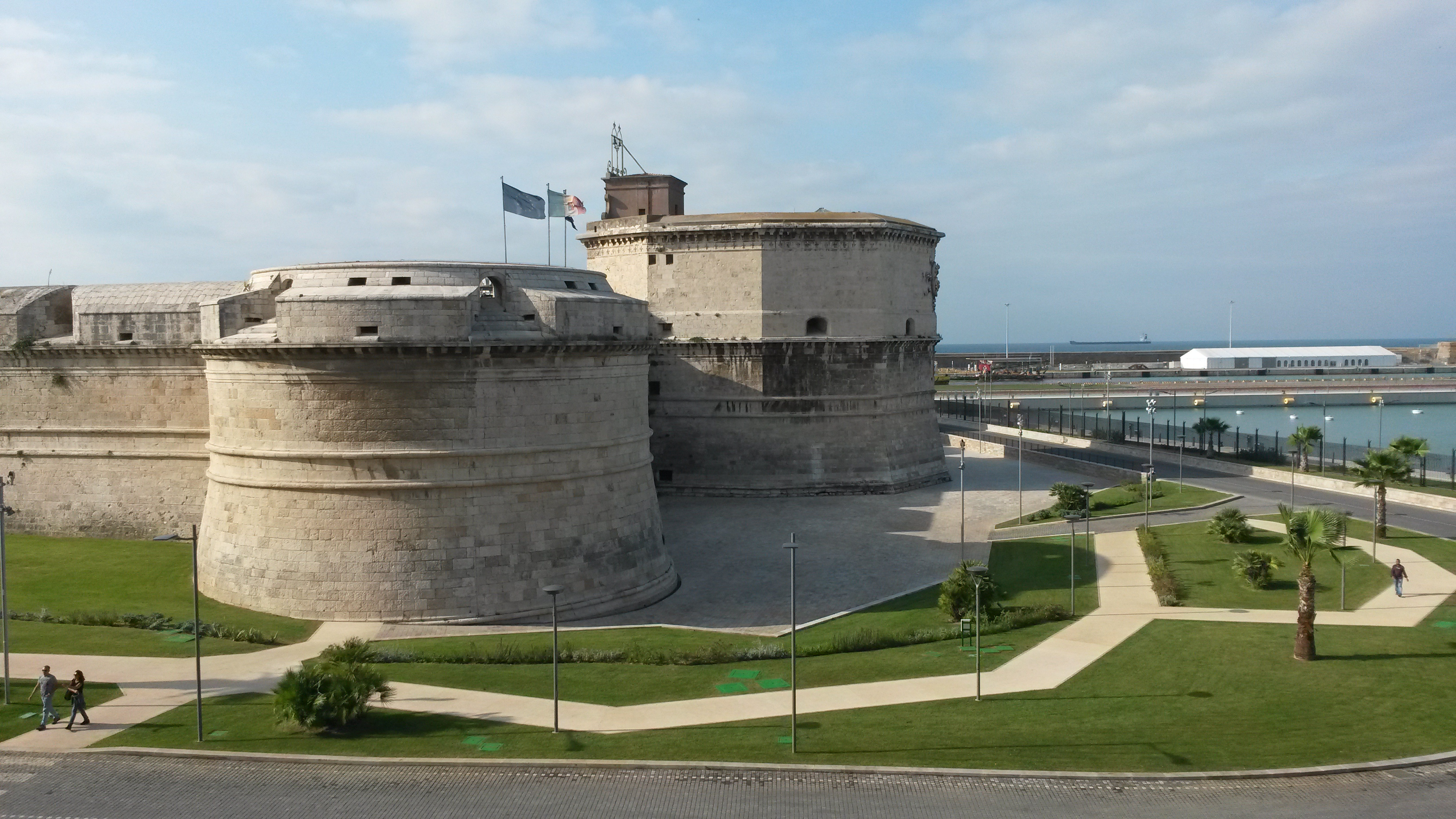 Foto 2014 forte michelangelo e porto civitavecchia